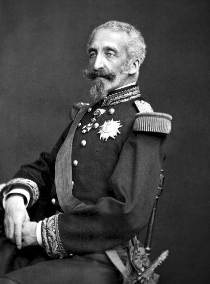 LE DUC DE NEMOURS (Louis Charles Philippe) 2ème fils du ROI LOUIS PHILIPPE. Né á PARIS em 1814. Mort á Versailles 1896. Père de MRG LE COMTE D'EU.